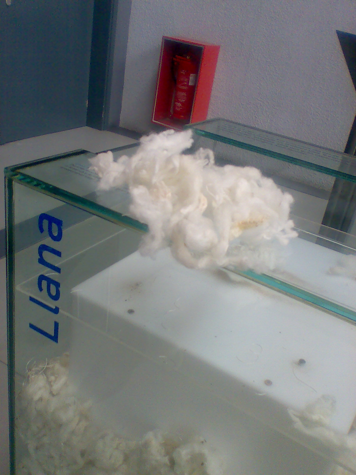 Fibra de lana. Museo de la Técnica de Terrassa